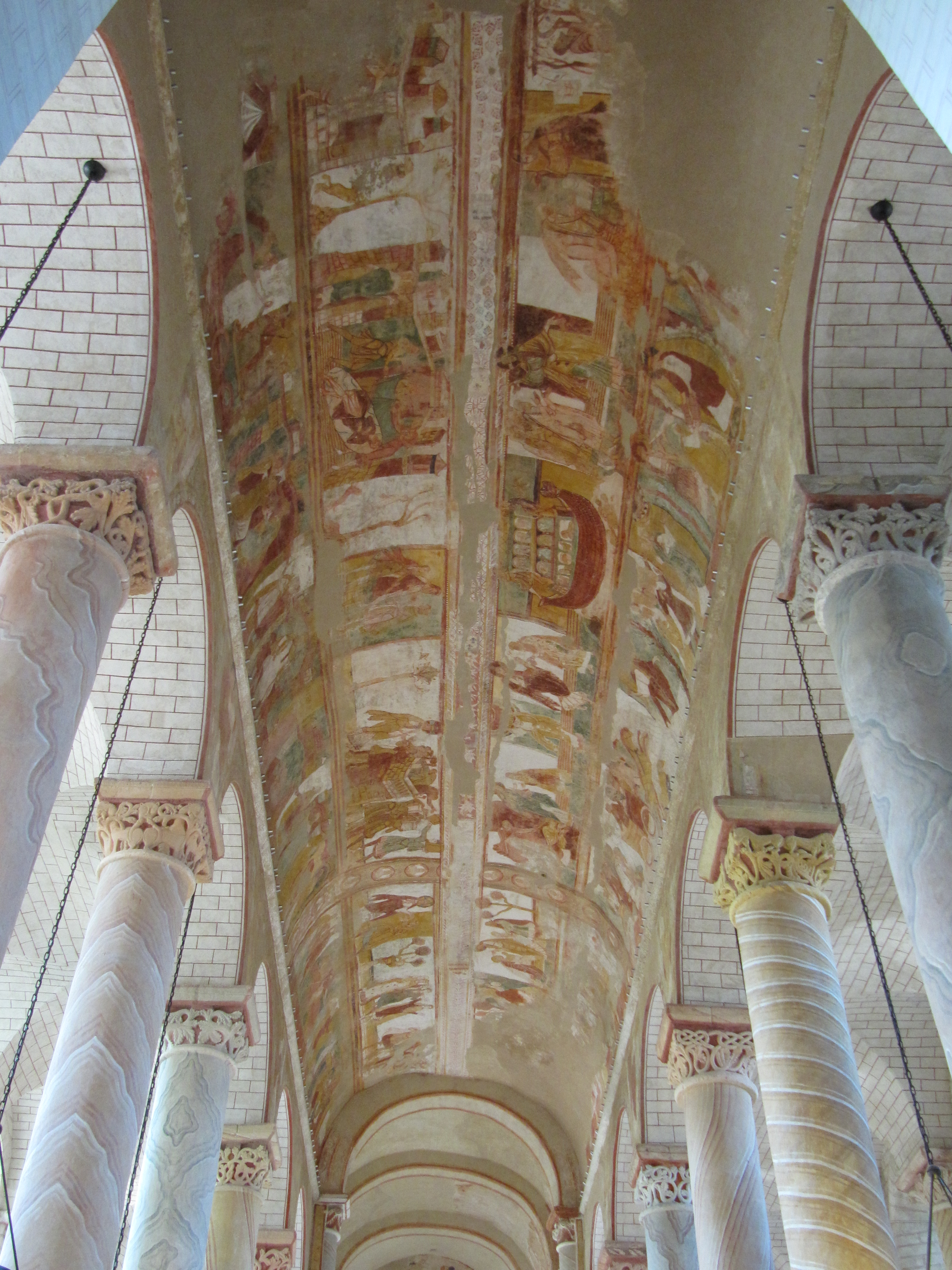 Saint Savin sur Gartempes